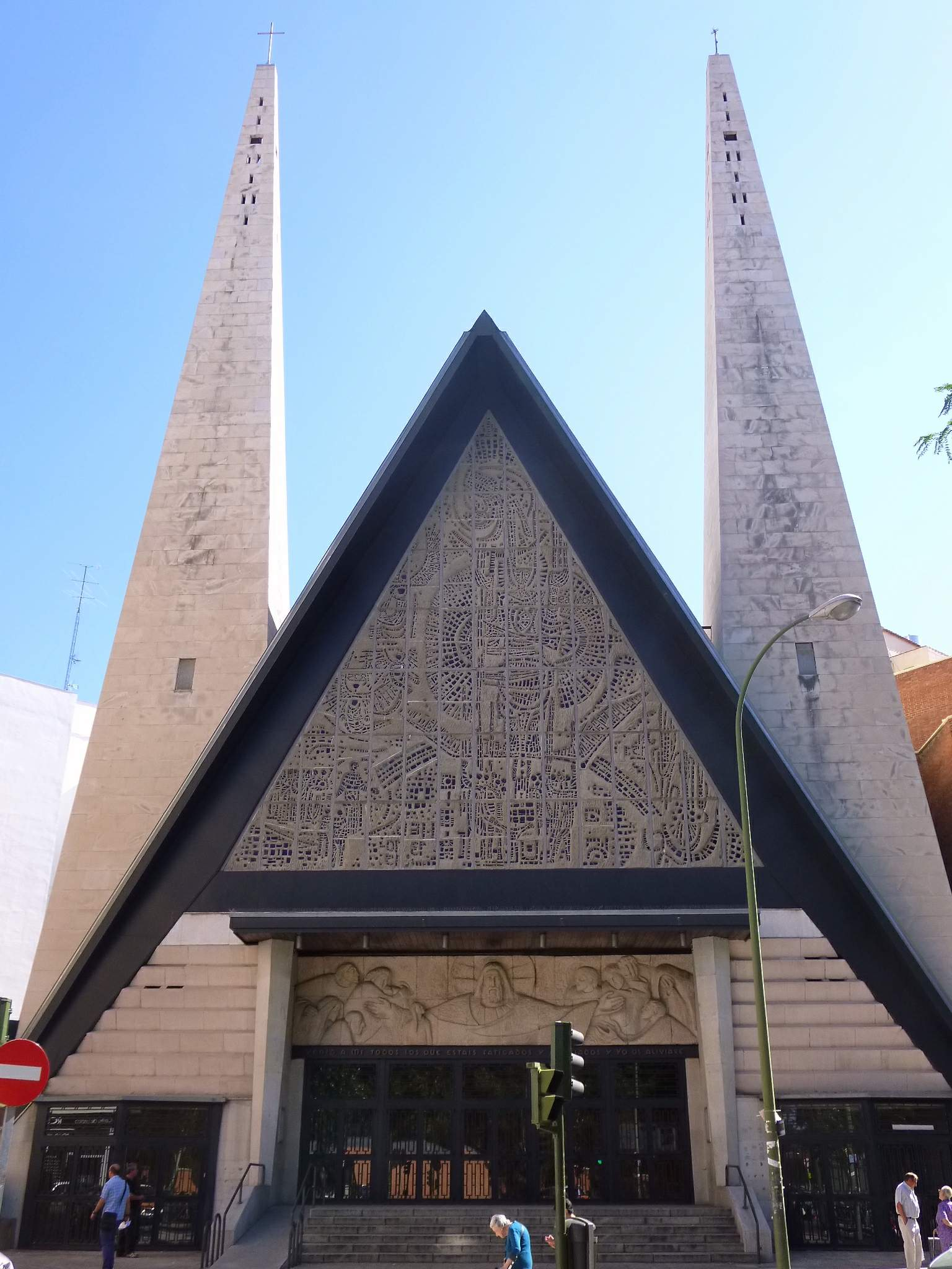 Iglesia del Santísimo Sacramento y Convento de los Padres Sacramentinos (Madrid)